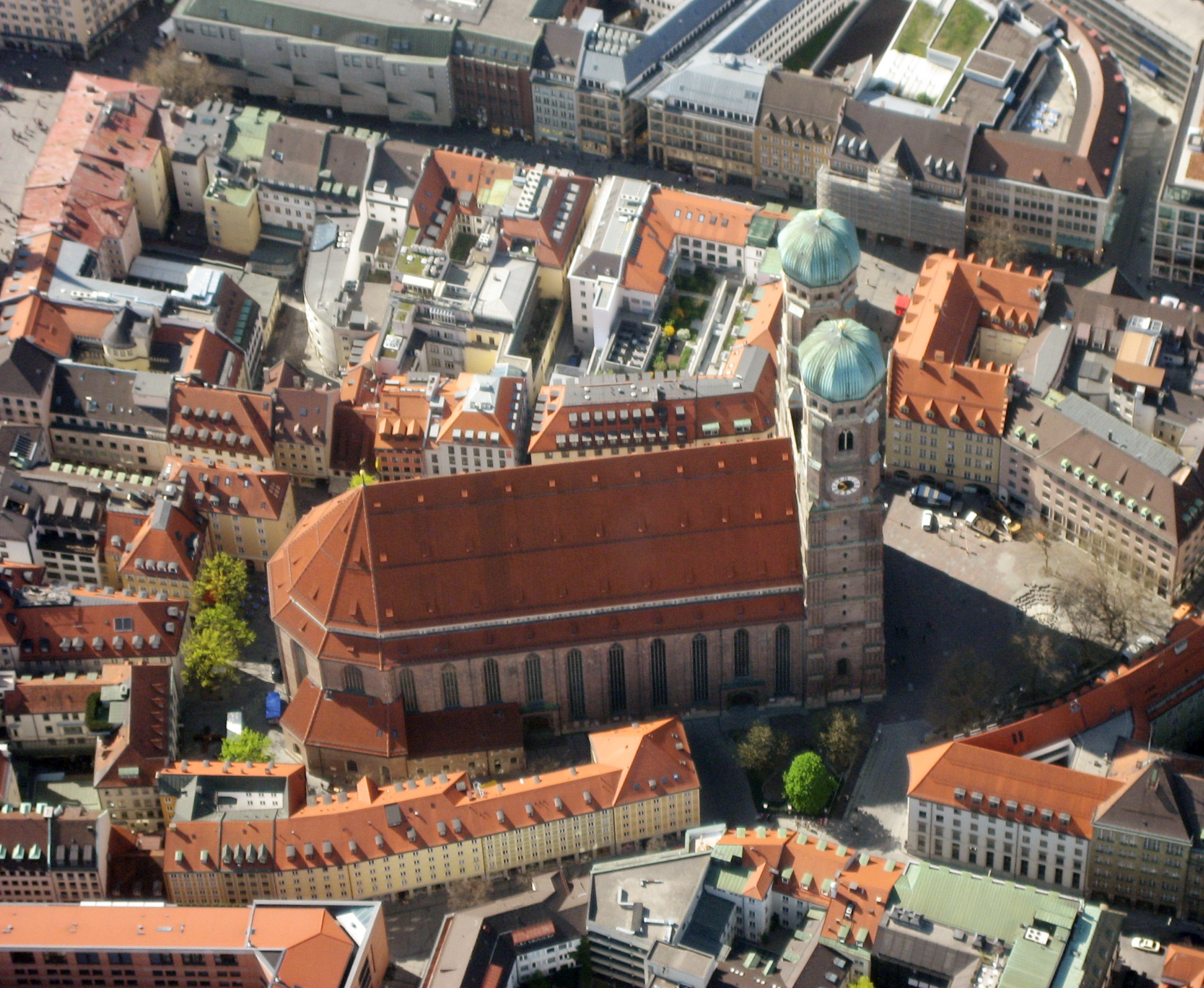 Luftbild der Frauenkirche in München